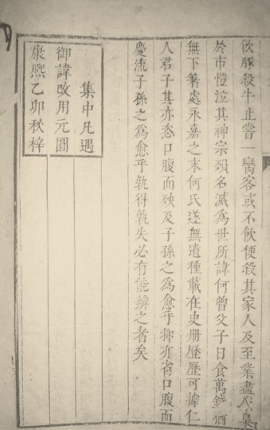 《臣鑒錄》（Record of Mirror of Courtiers）